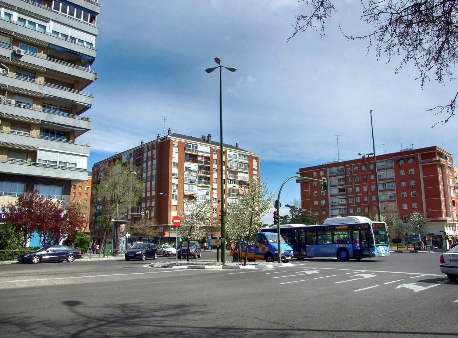 Calle de Príncipe de Vergara desde la Plaza de Cataluña, en el barrio de Ciudad Jardín, distrito de Camartín, Madrid, España.